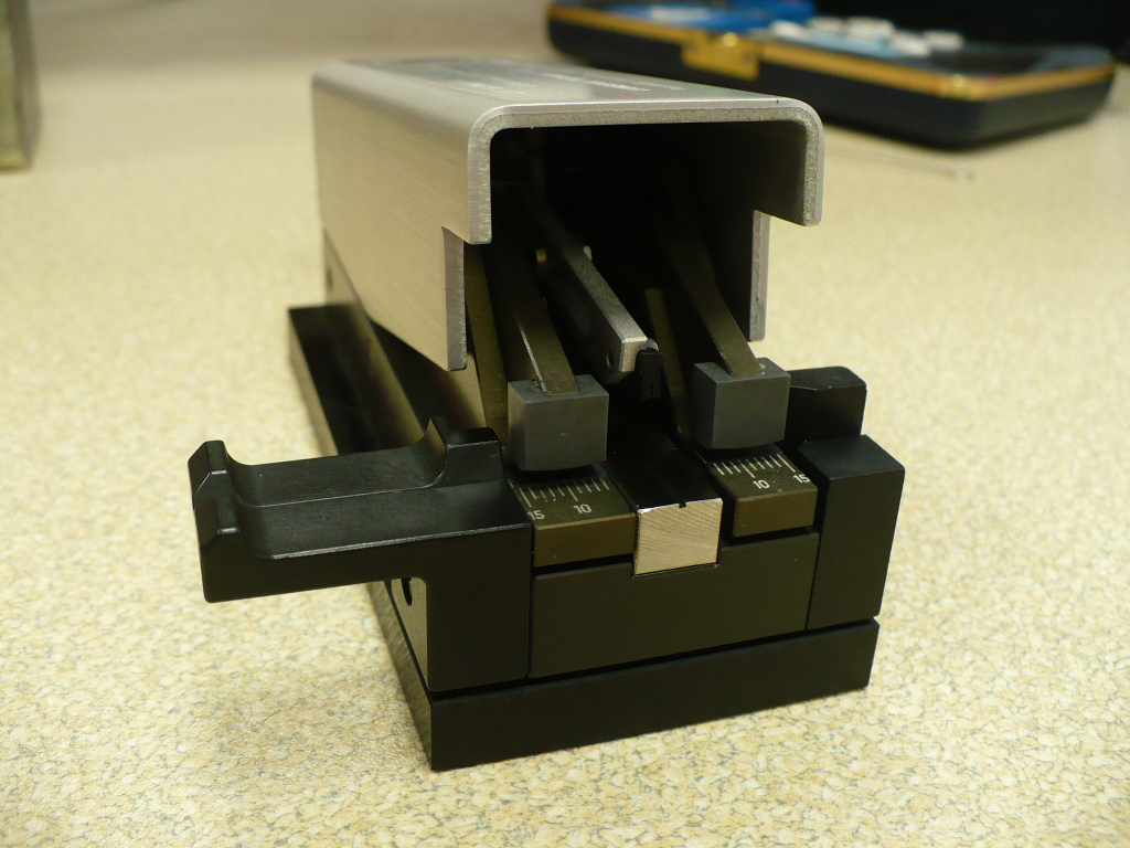 Obcinarka do światłowodów (przyrząd do precyzyjnego przycinania światłowodów)